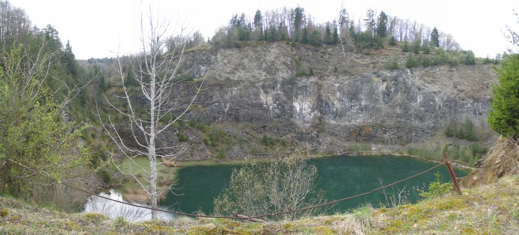 Der Berg Hewenegg (Burgstelle)